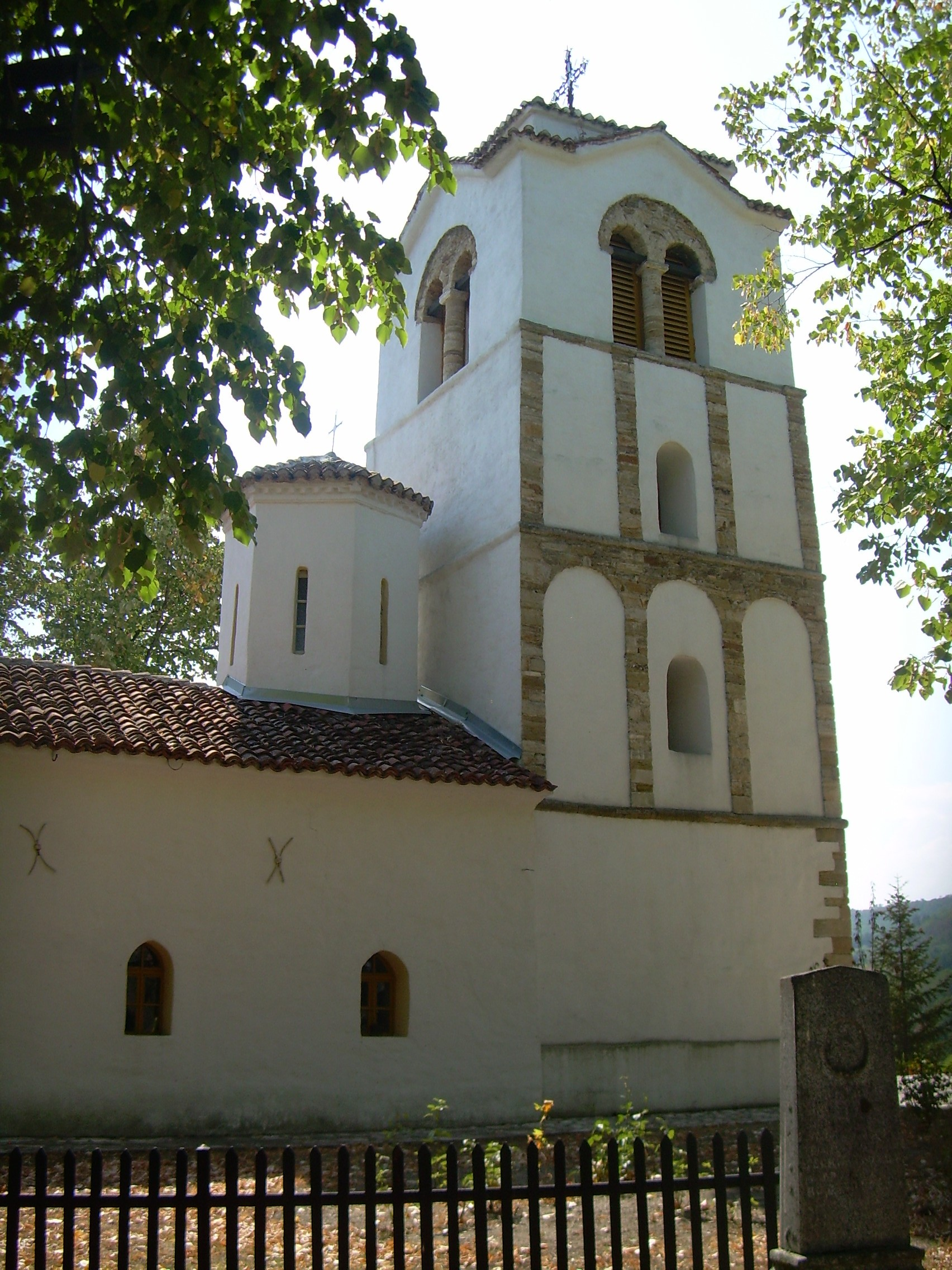 Кожетинска црква, посвећена Вазнесењу Господњем, прва је освештана црква у слободној Карађорђевој Србији 1804. године, и последње упориште устаника у Првом српском устанку - звано Шанац кожетински – које је одолевало Турцима све до 1813. године, када га је заузео лесковачки Шашит-паша.